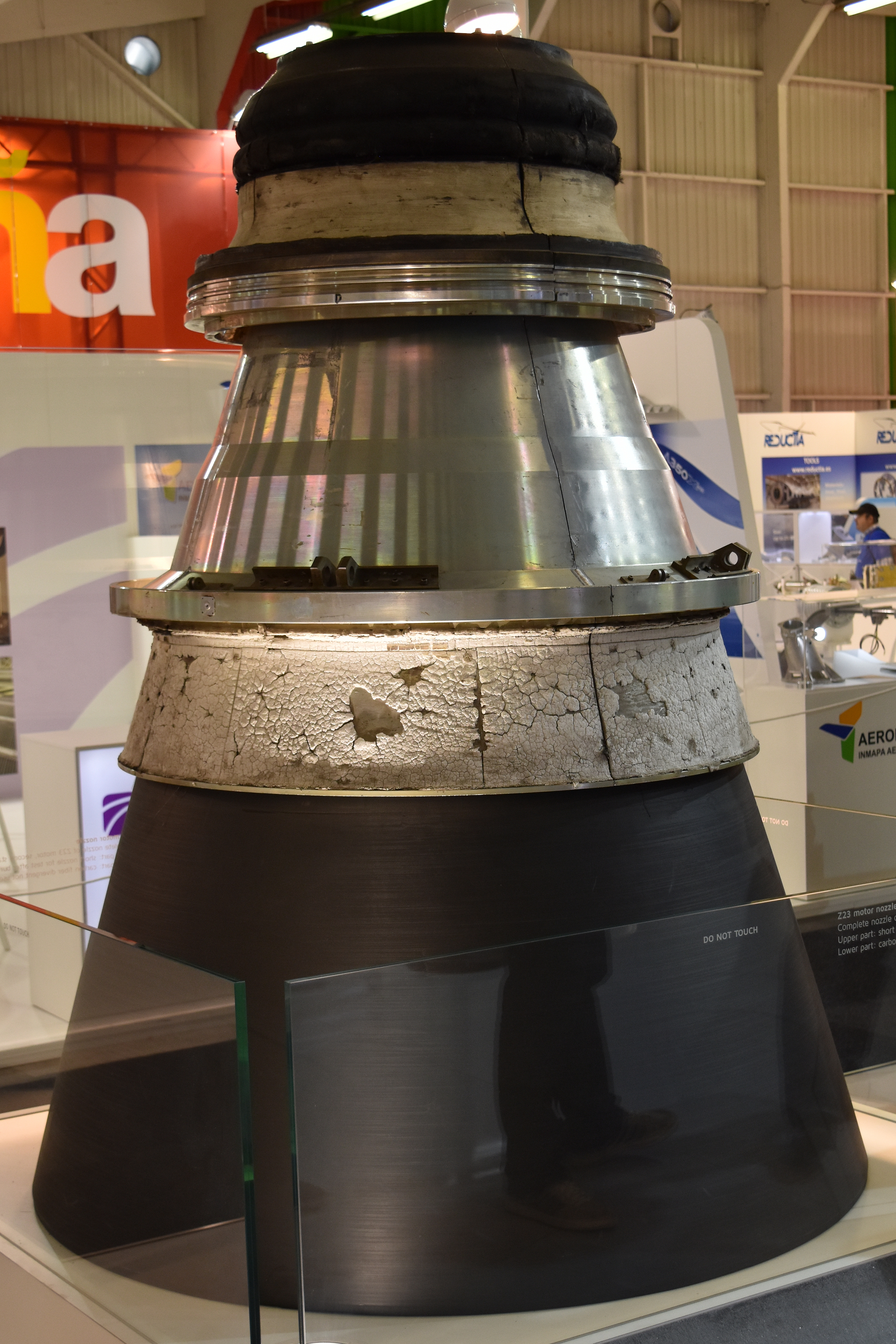 Tuyère de l'étage Z23 du lanceur Vega, Salon du Bourget 2015